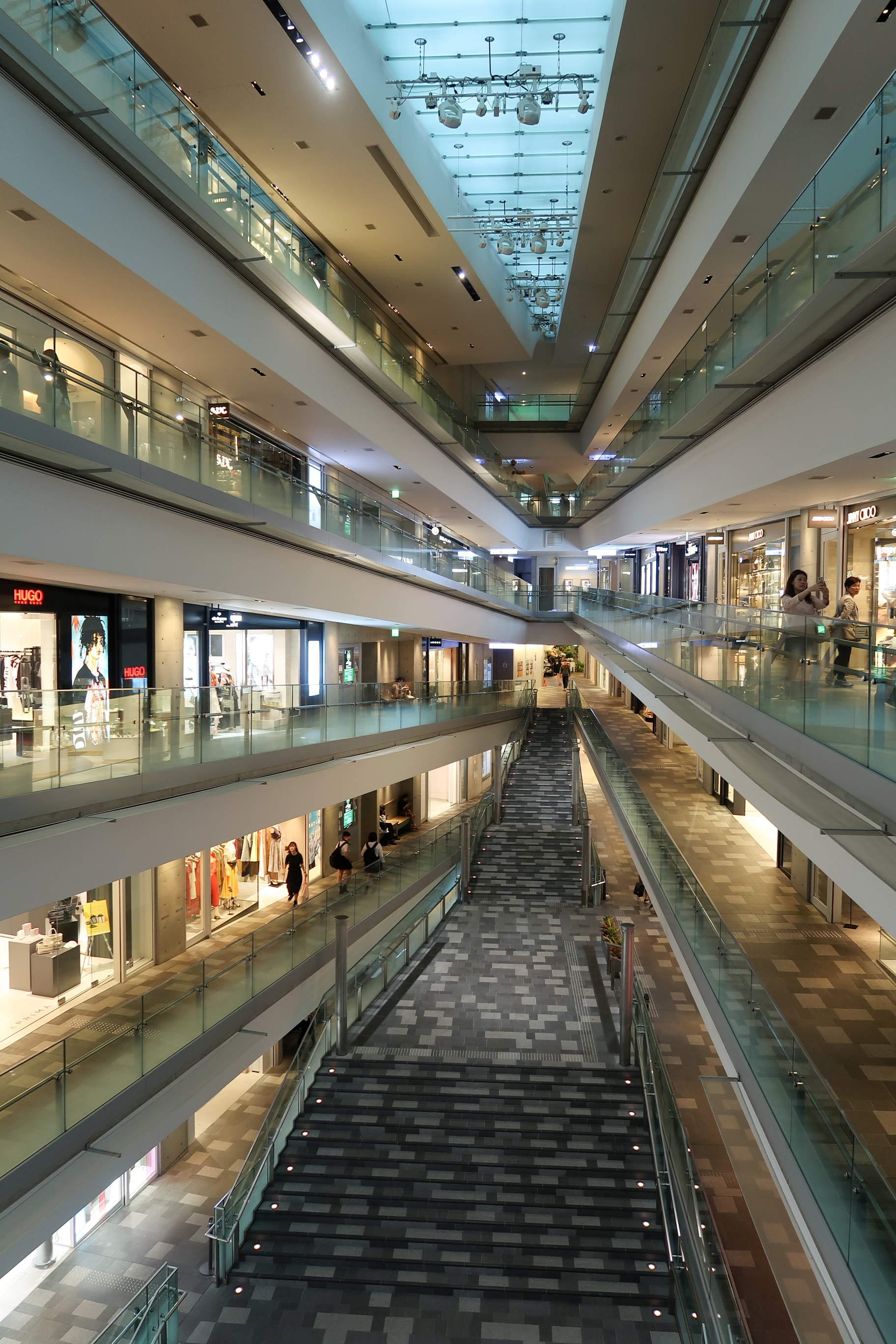 Omotesando Hills